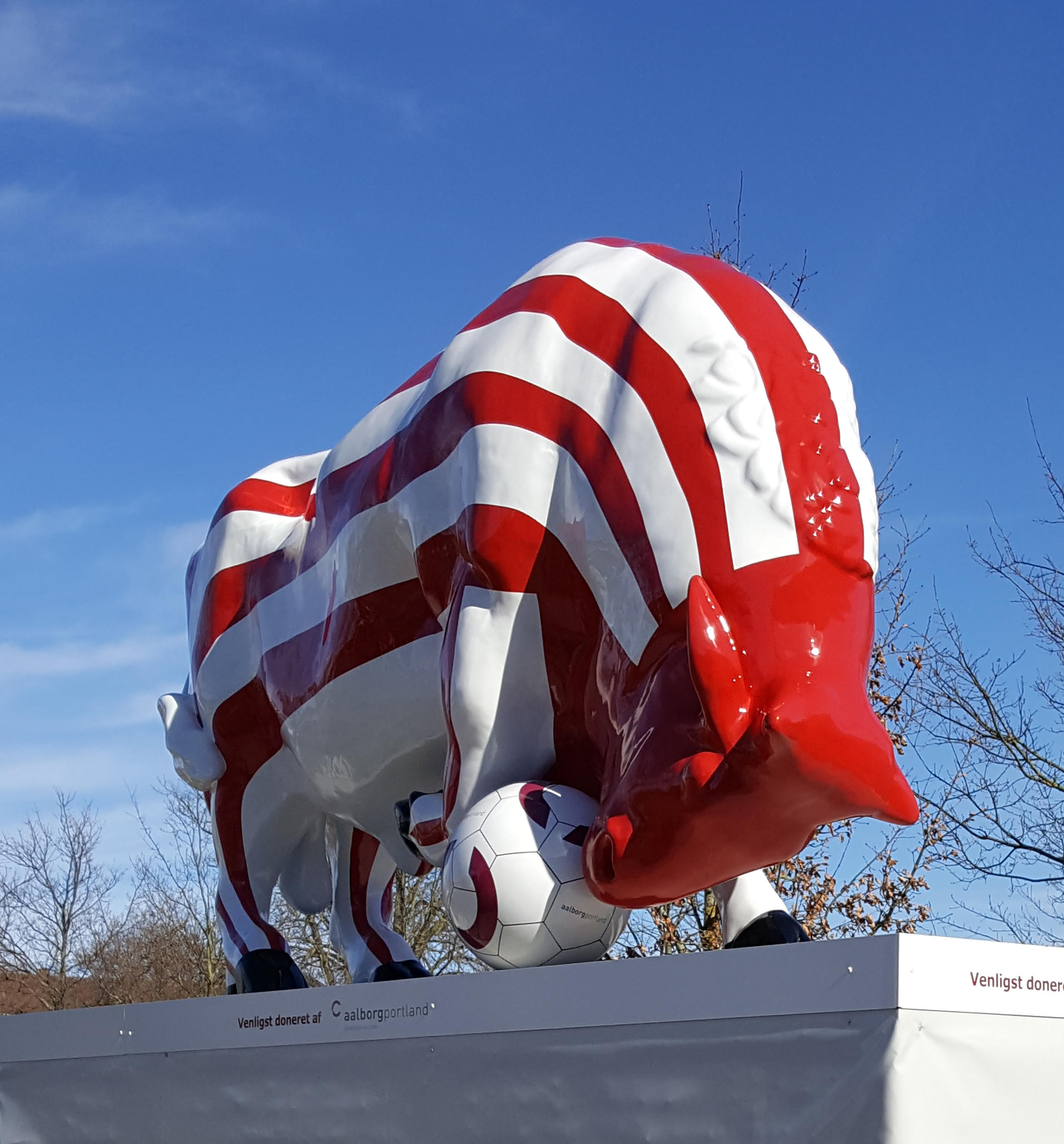 En kopi af Cimbrertyren, malet som AaB's spillerdragt, er opstillet foran Aalborg stadion. Den er en gave fra stadionsponsoren, Aalborg Portland.